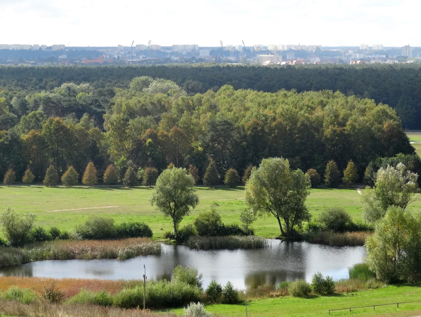 Widok z Góry Myślęcińskiej w Bydgoszczy (na terenie Leśnego Parku Kultury i Wypoczynku "Myślęcinek")